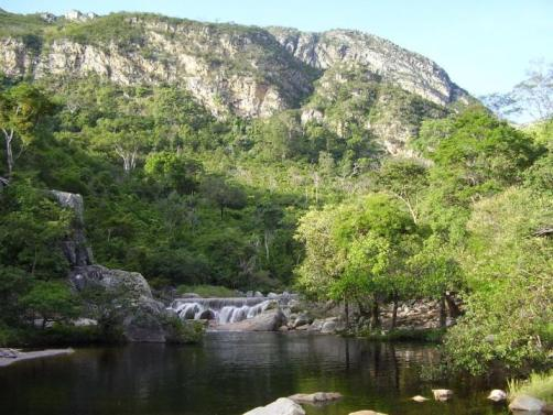 Insira_uma_descrição_para_sua_foto